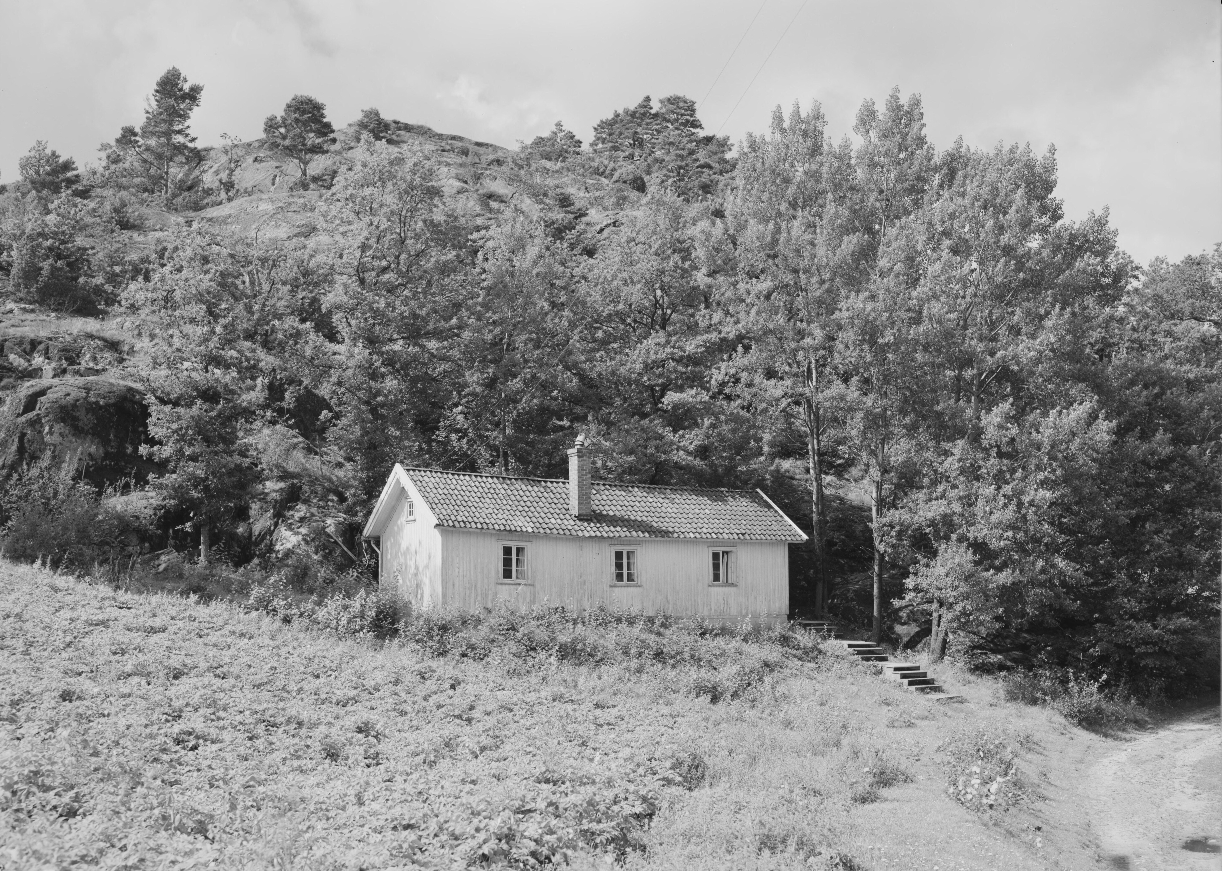 Bildet er hentet fra Nasjonalbibliotekets bildesamling Nørholmen, Grimstad, Aust Agder